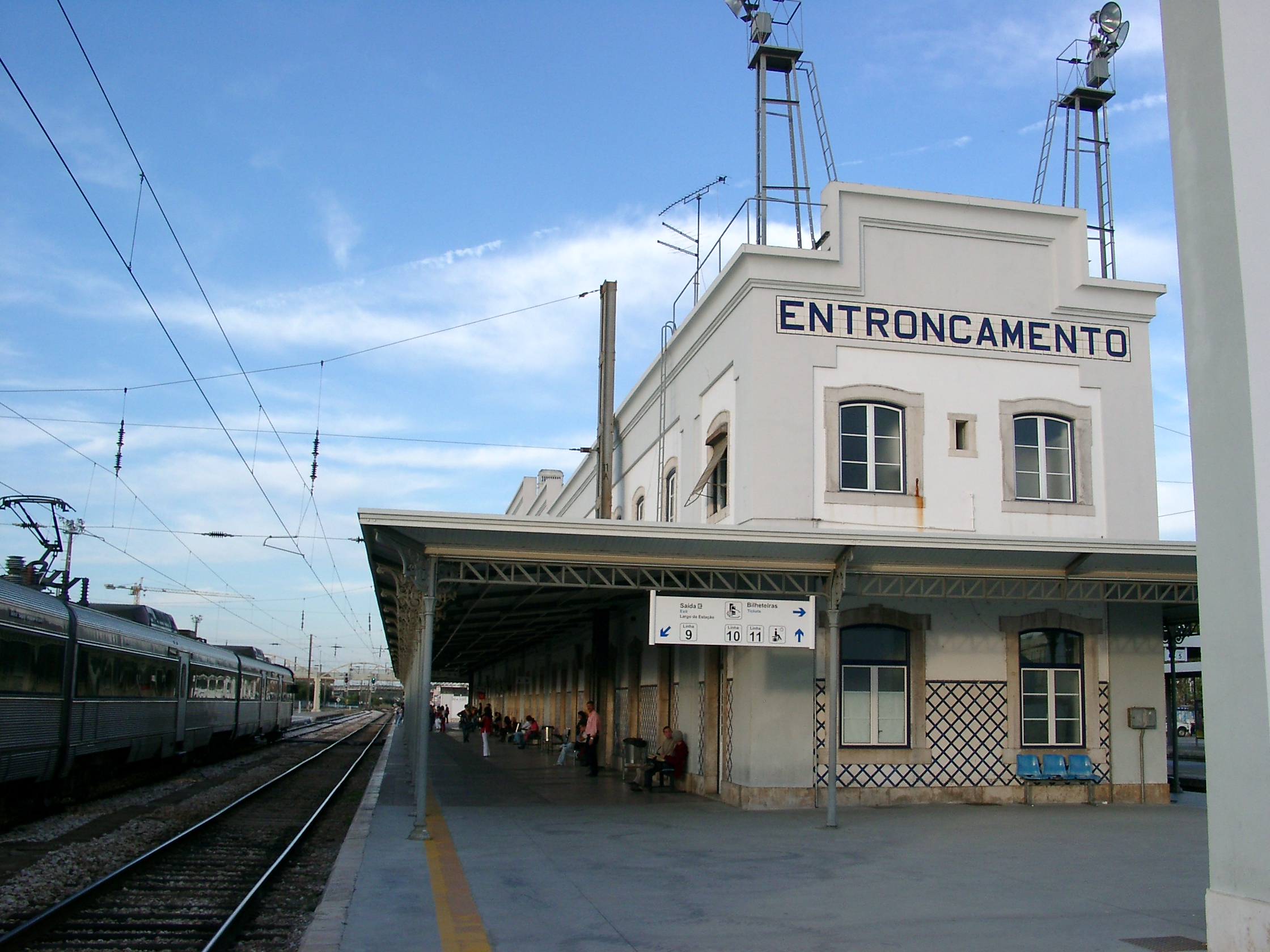 Bahnhof von Entroncamento